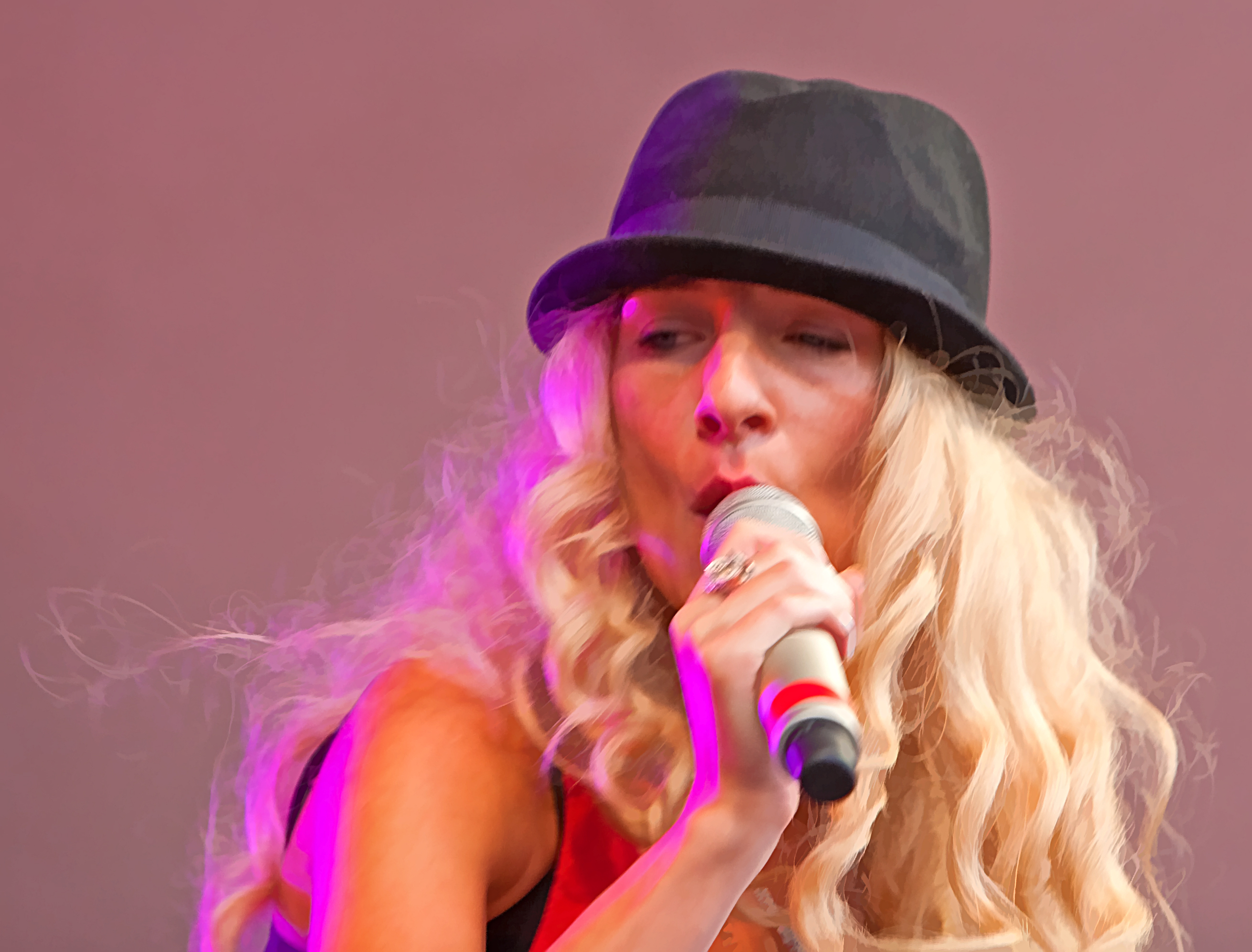 Jonna Lee at Stockholm Pride 2010